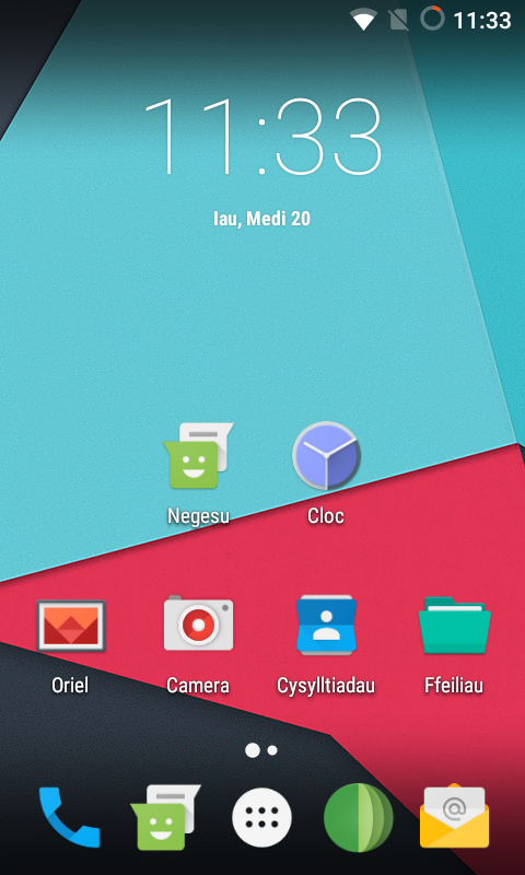 Dyma sgrinlun o'r fersiwn arbrofol cyntaf o Android yn Gymraeg - lleoleiddiad rhannol o Lineage OS 14.1.